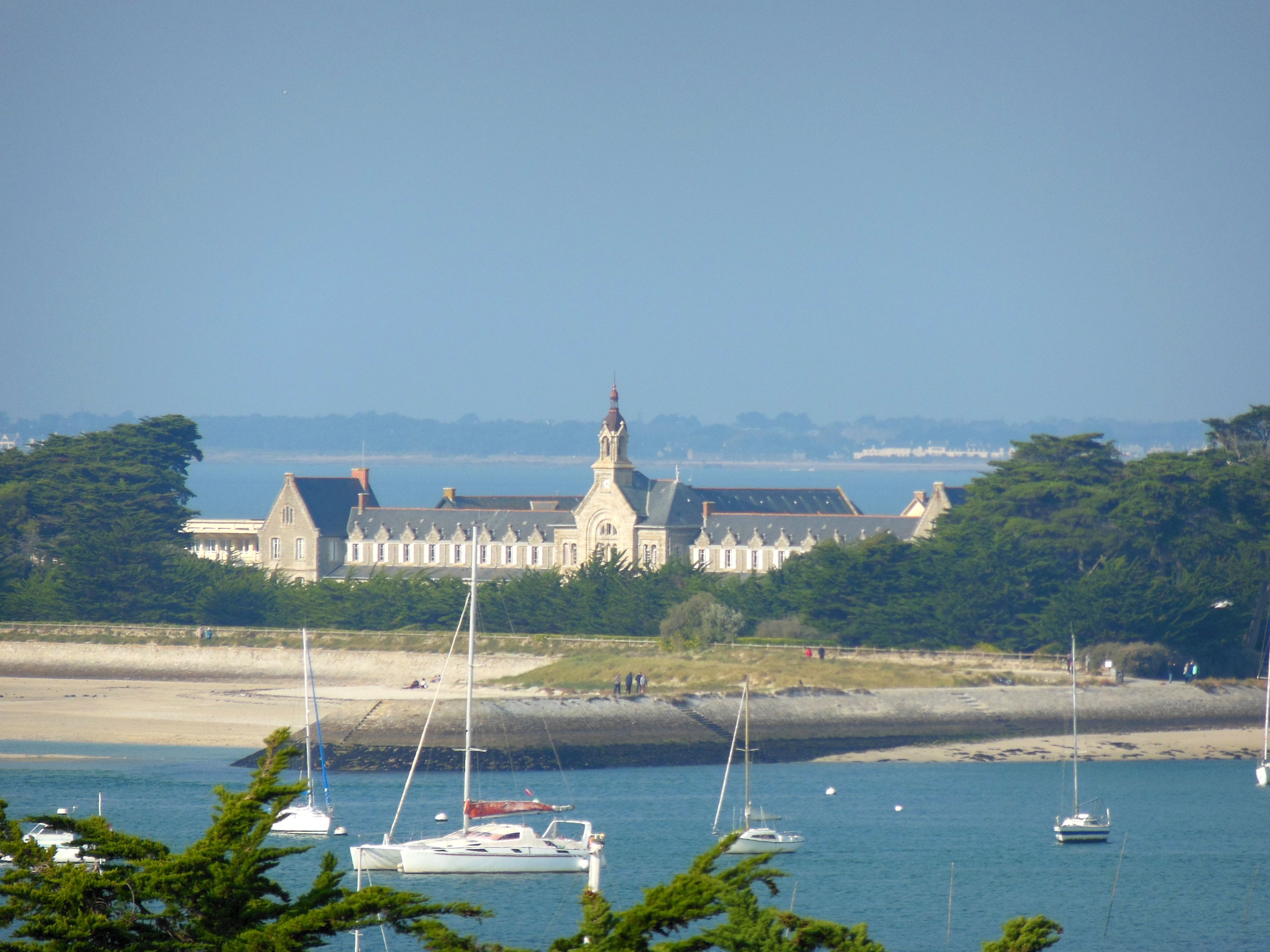 Centre héliomarin de Pen-Bron (La Turballe), vu du Mont-Esprit situé sur la commune du croisic